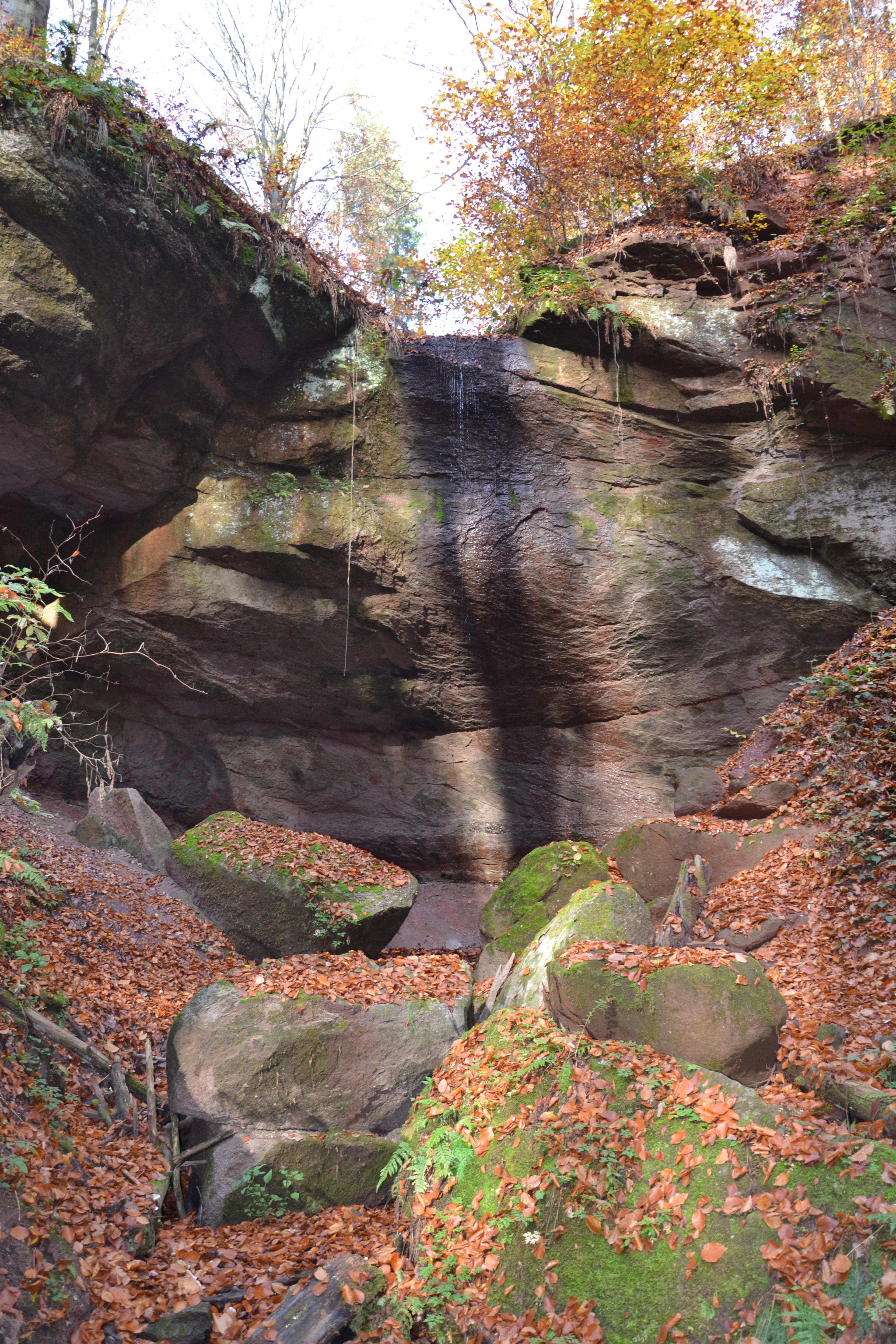 Dolní vodopád s výškou 8 m